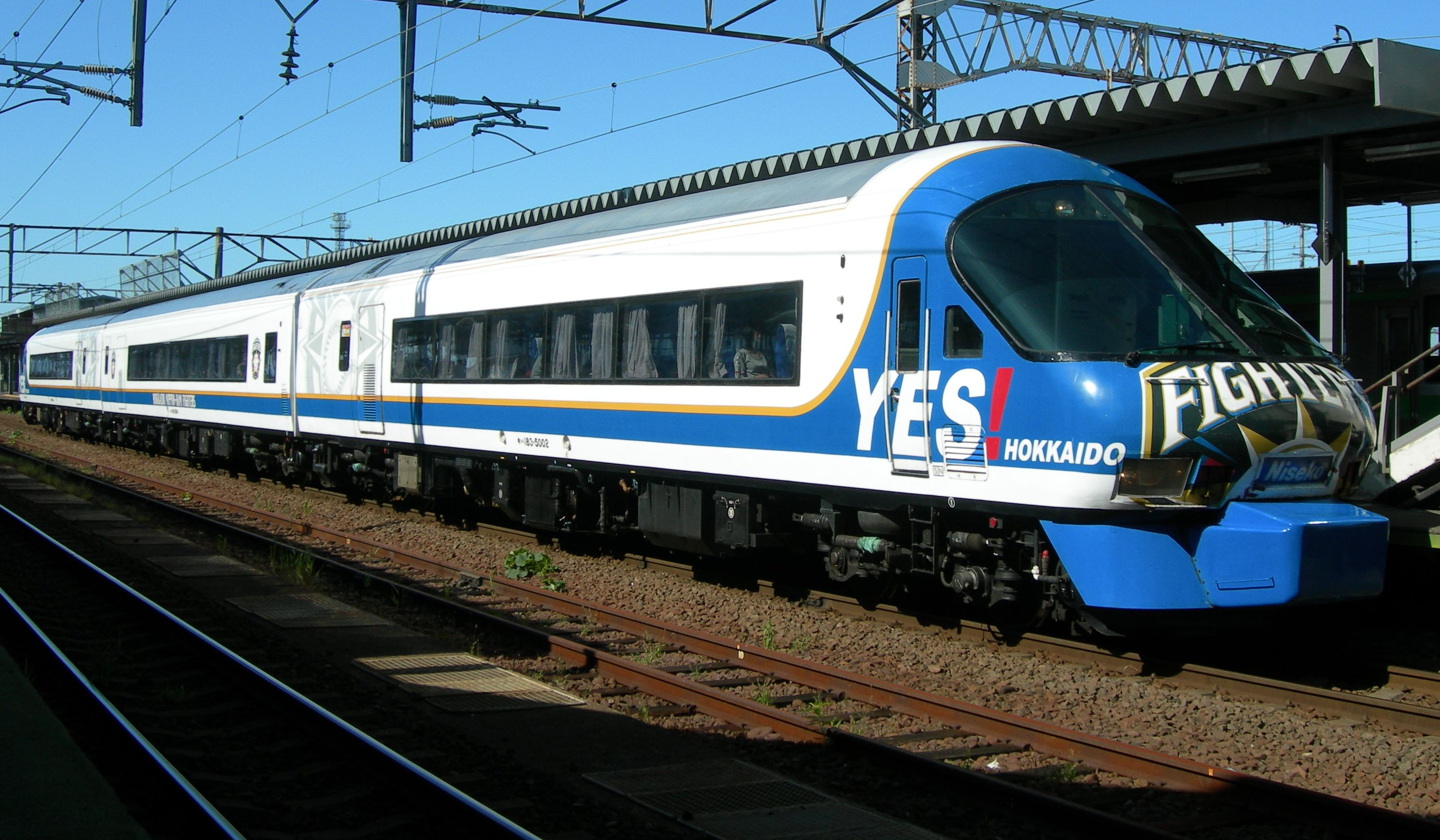 JR北海道キハ183系5000番台ニセコエクスプレス 岩見沢駅で撮影